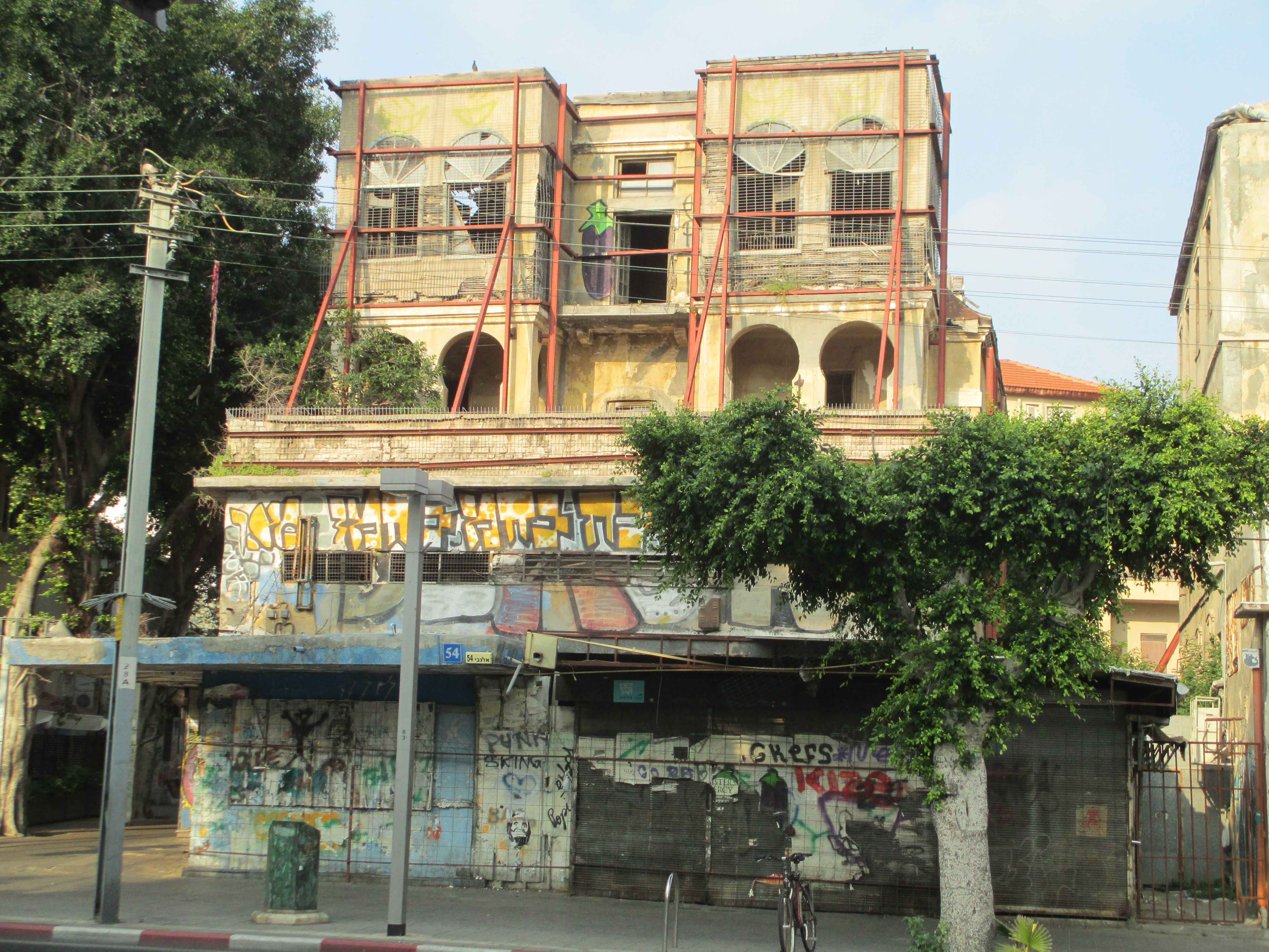 אלנבי 54. בקומת הקרקע שכן בזמנו קפה עטרה